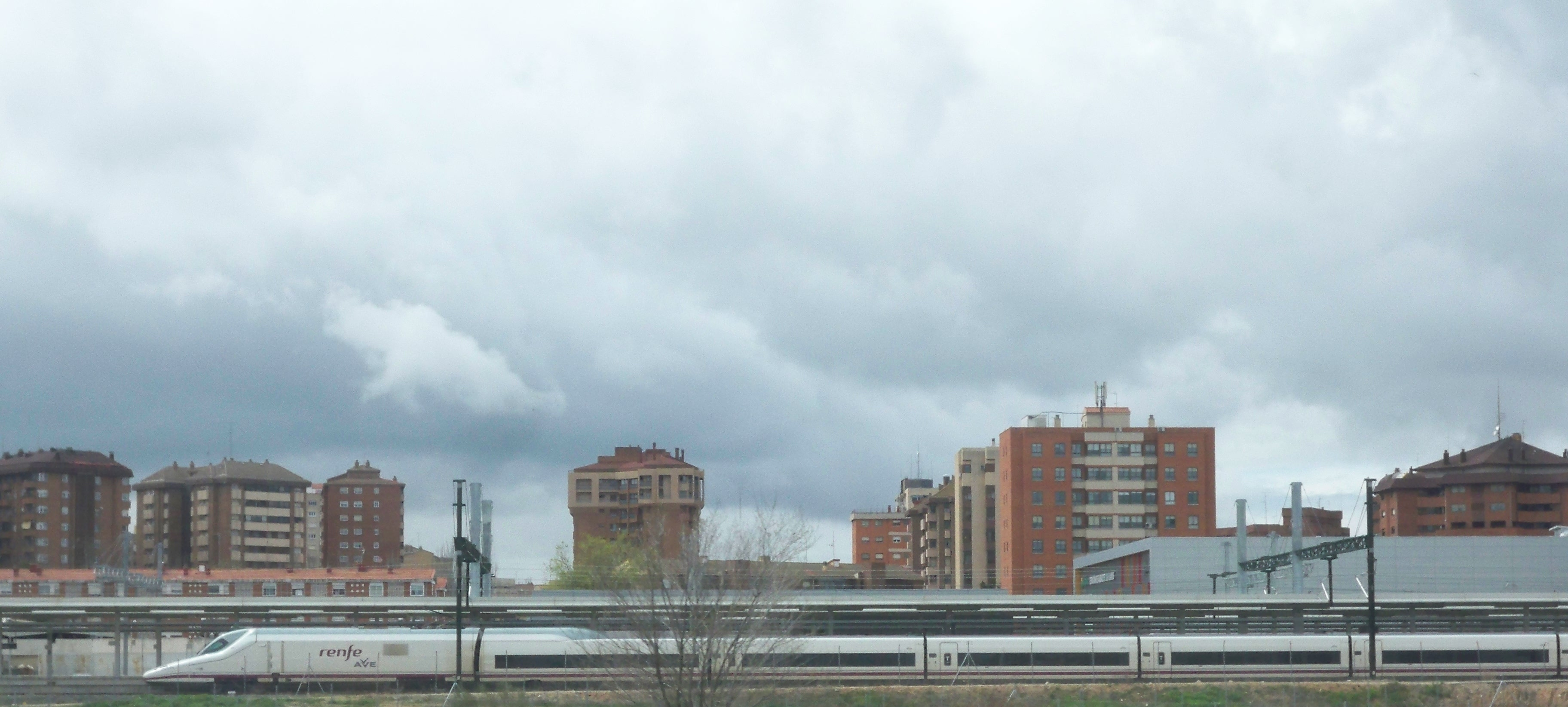 Fotografía tomada desde la autovía A-30, en donde se puede ver la parada realizada en la Estación de Ferrocarril Albacete-Los Llanos de un tren AVE.